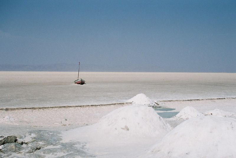 Chott El Djerid, Tunisia.